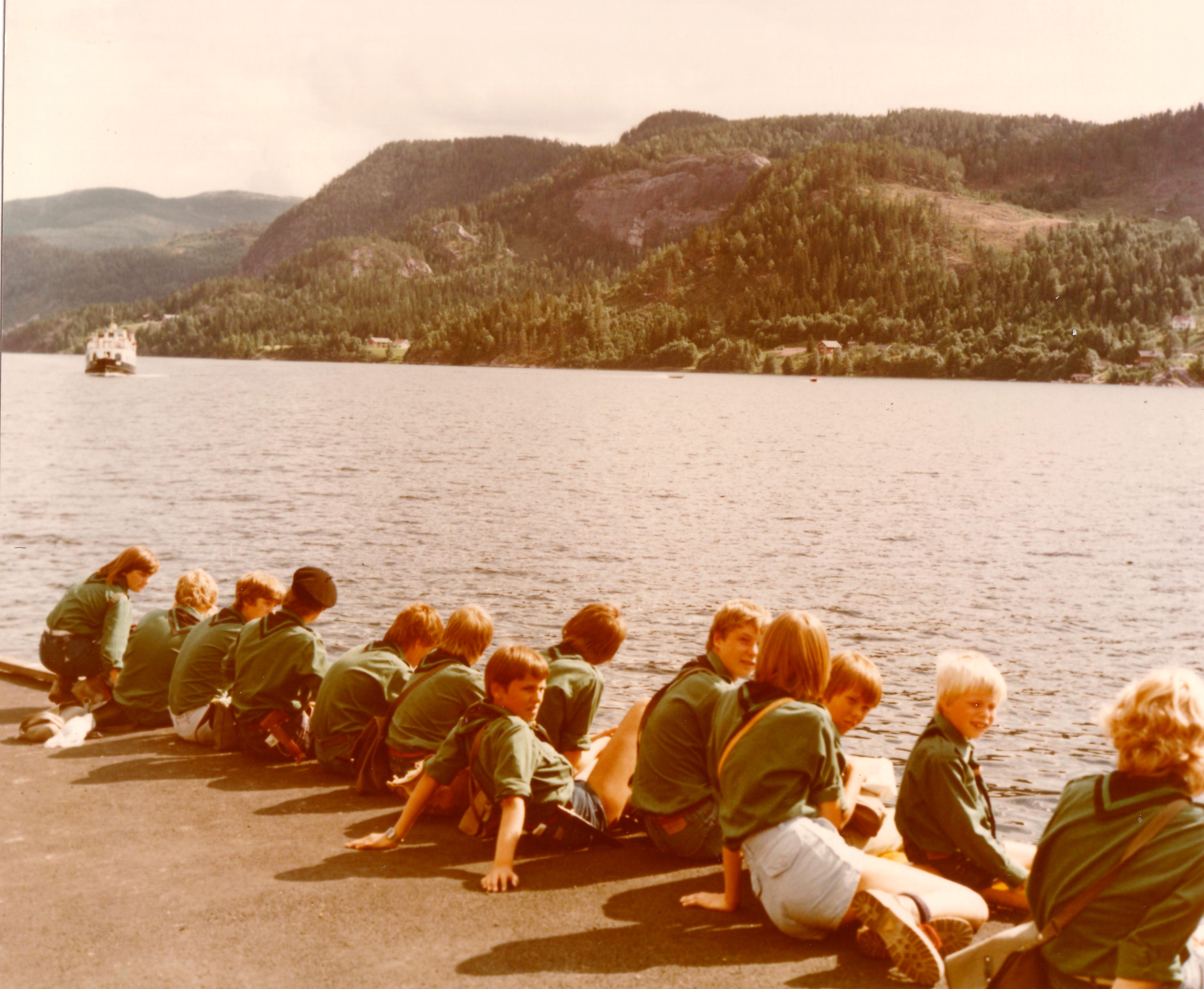 Bandak-See (Norwegen), Anlagestelle für die S/M Viktoria in Lårdal